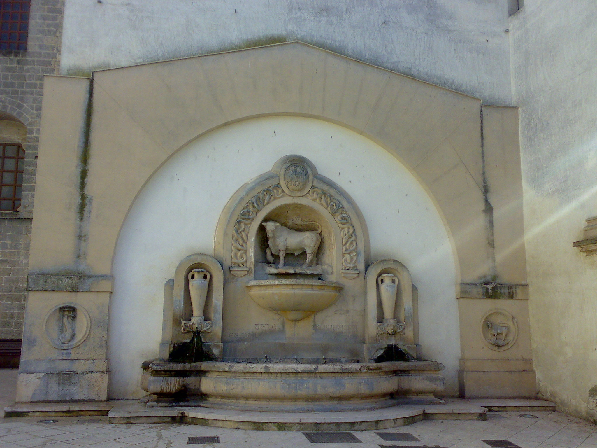 Nardò Fontana del Toro